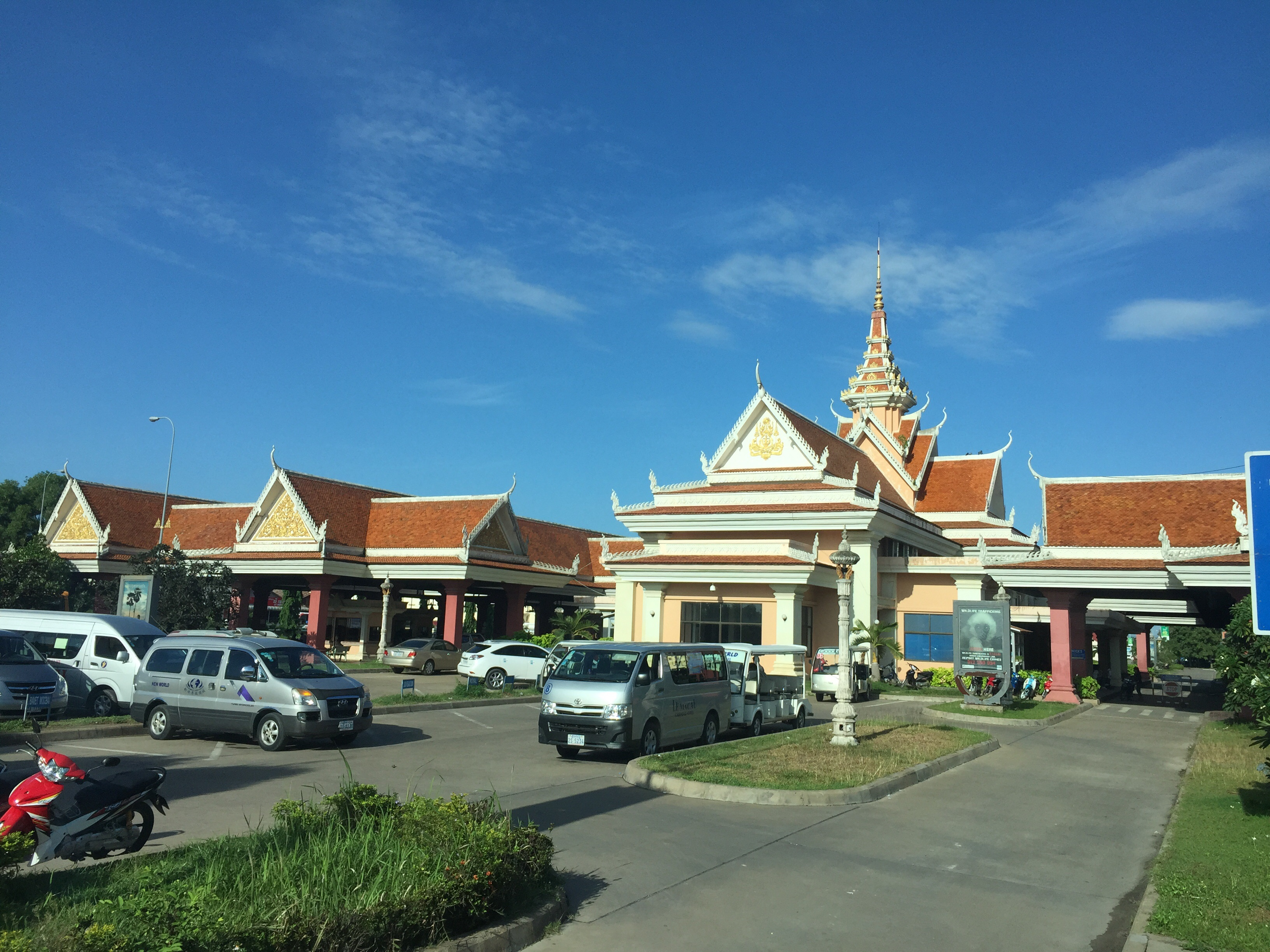 Mộc Bài, Lợi Thuận, Bến Cầu, Tây Ninh Province, Vietnam